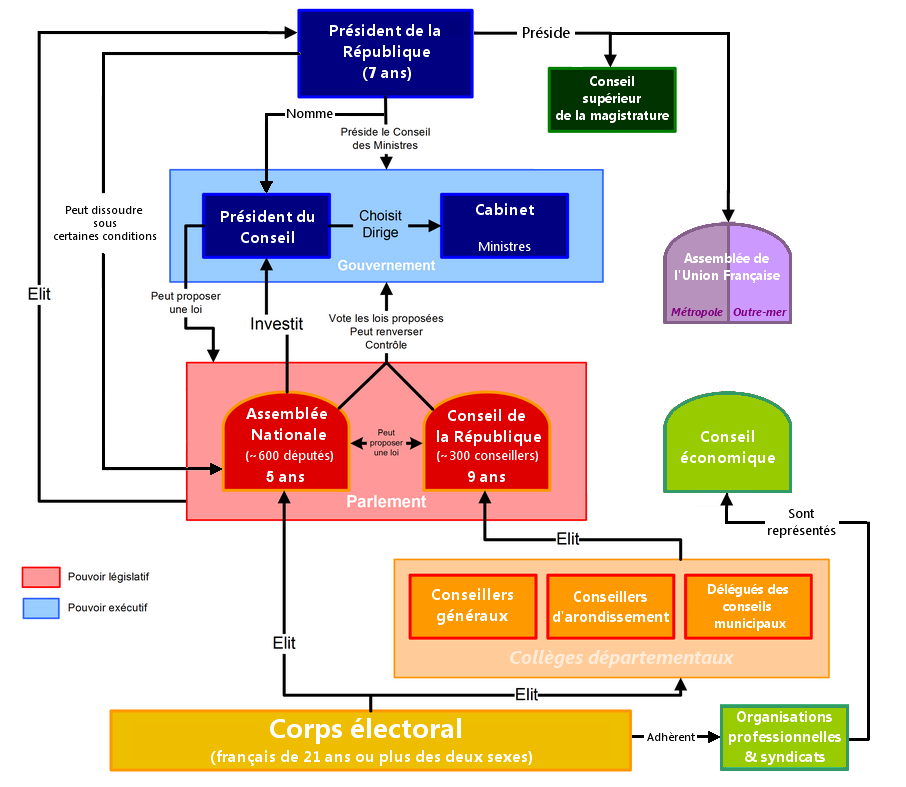 Organigramme de la IVème République